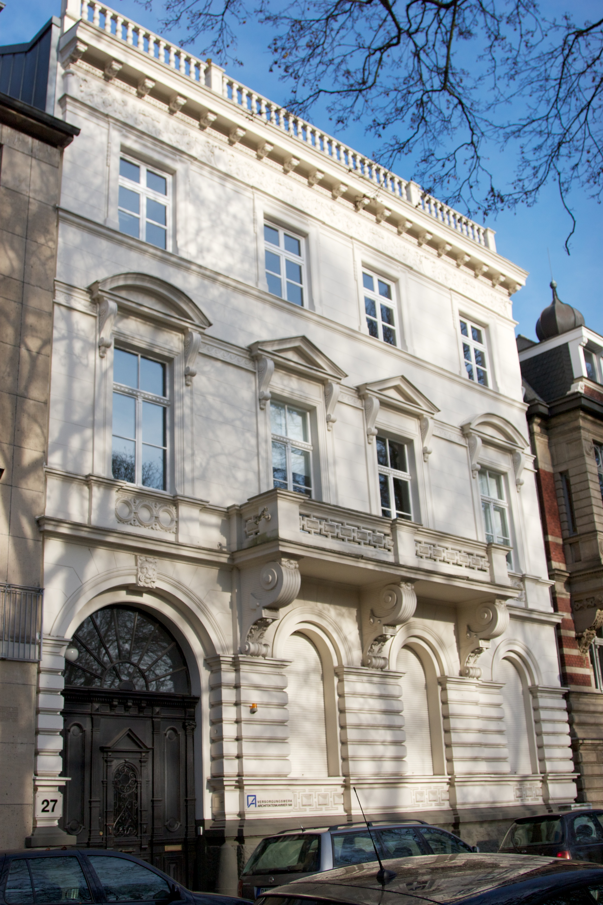 Inselstraße 27, Düsseldorf